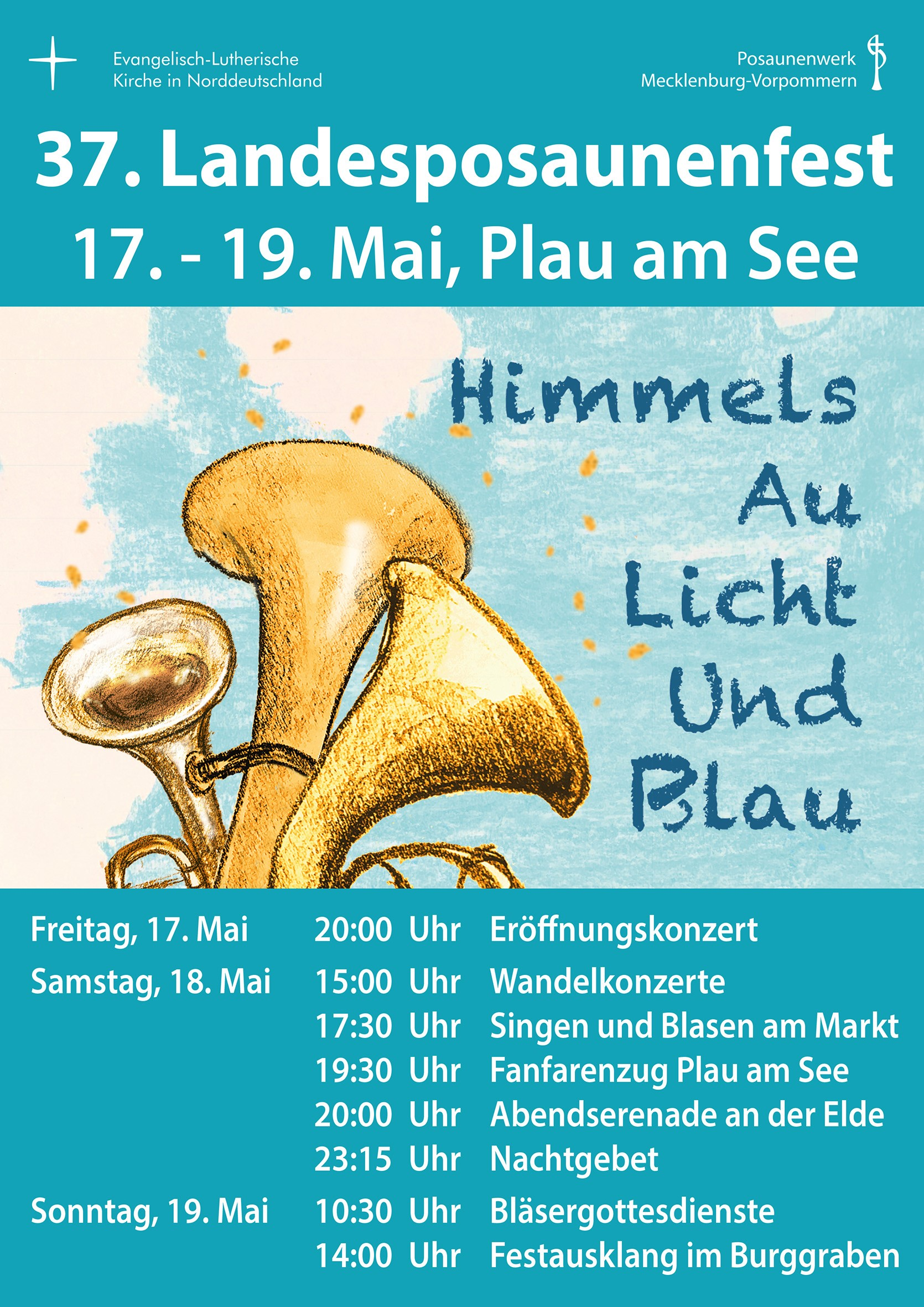 Plakat zum 37. Landesposaunenfest in Plau am See im Mai 2019, zugleich 20-jähriges Dienstjubiläum des Landesposaunenwarts Martin Huß